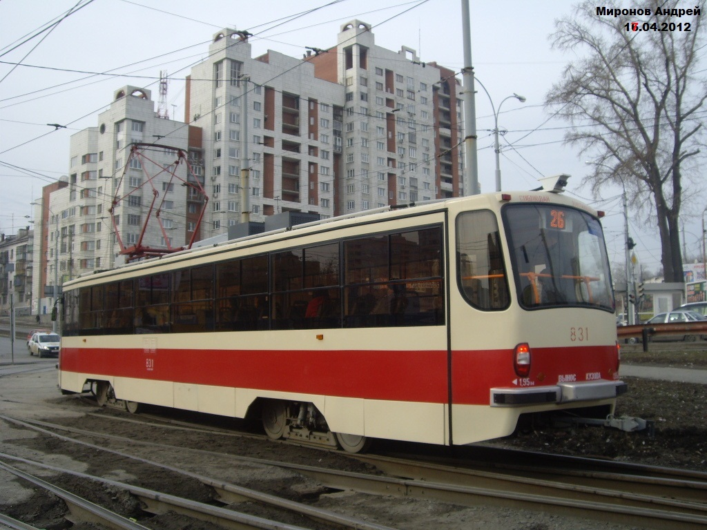 (26 маршрут)